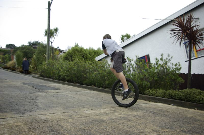 Baldwin Street uni challenge